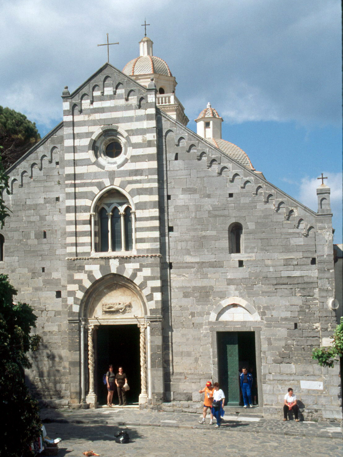 Porto Venere 2004